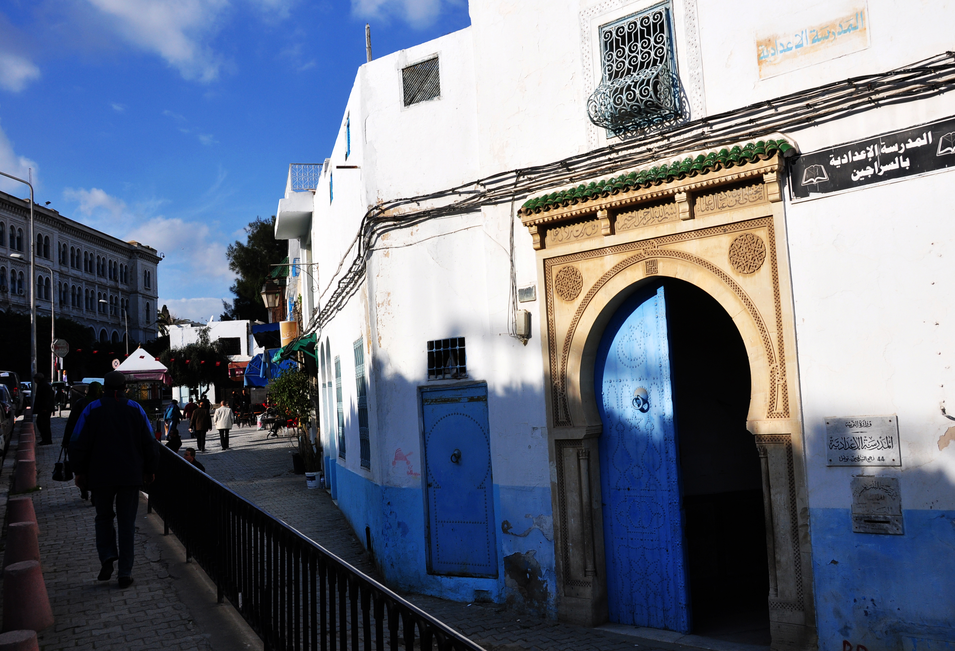 Souk rue des selliers